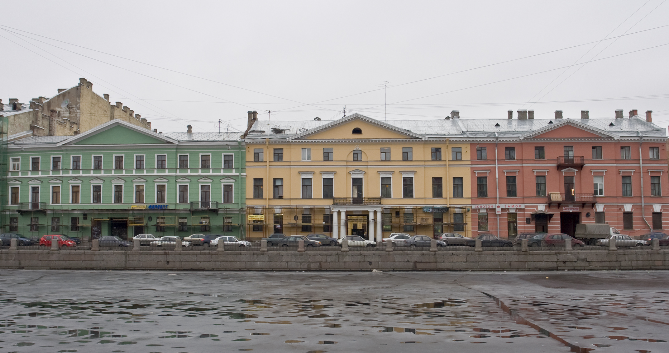 Набережная реки Фонтанки, 97-99 (вид с противоположной стороны Фонтанки)